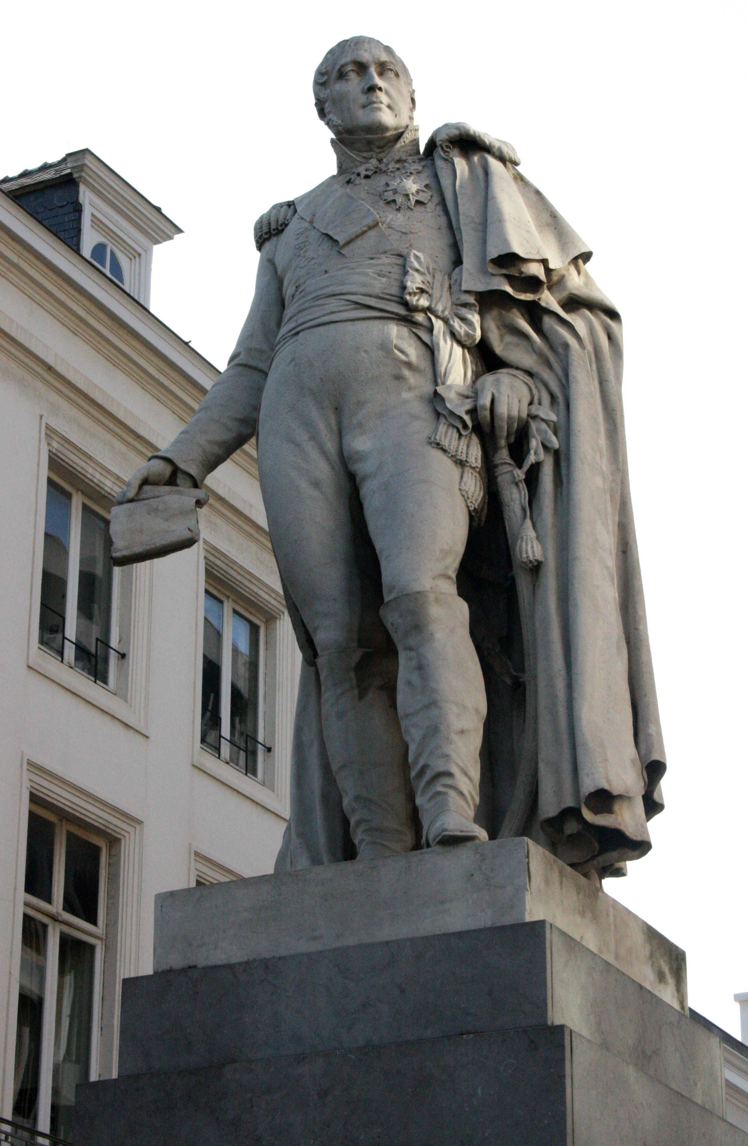 Statue du général Belliard, rue Baron Horta, Bruxelles, Belgique